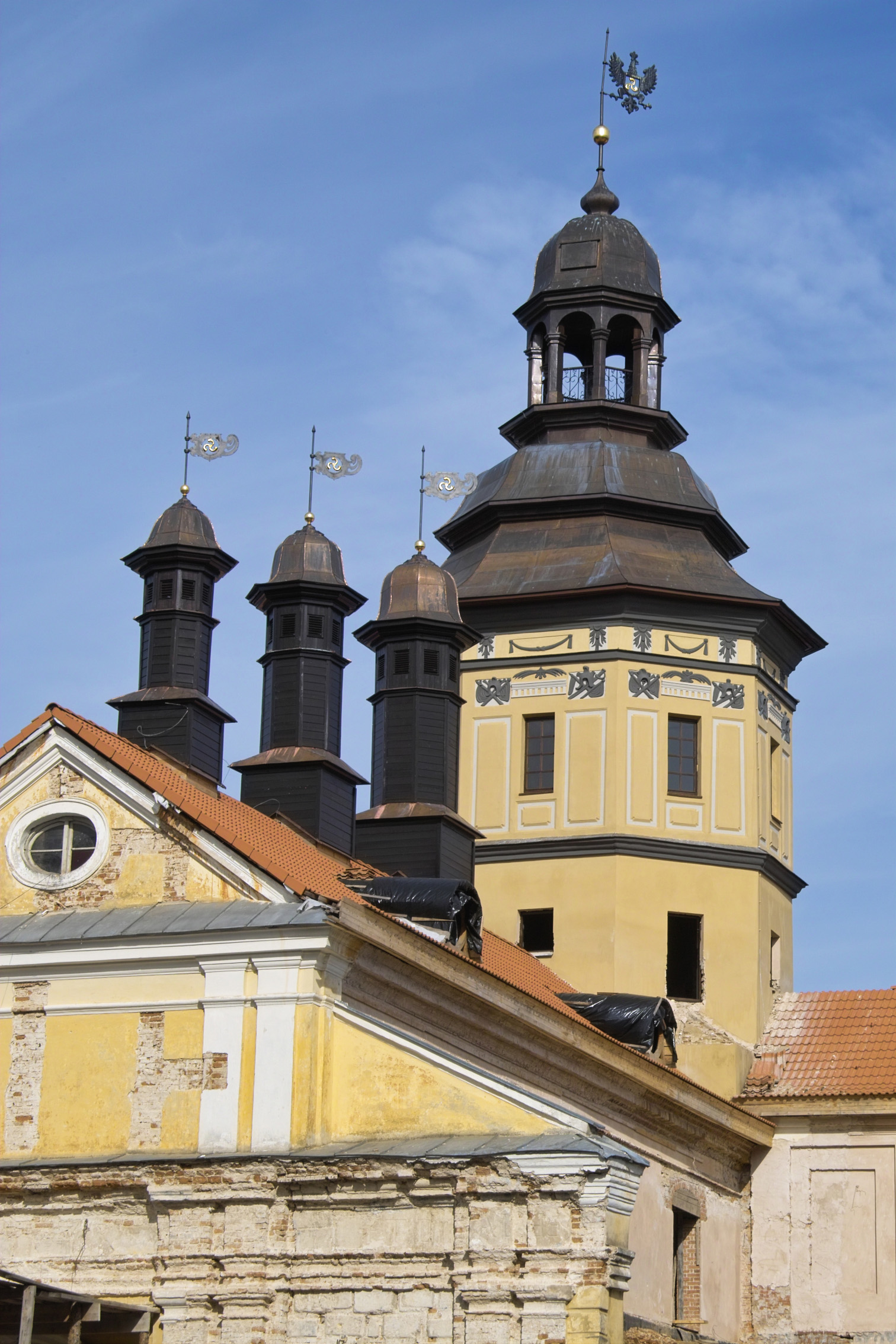 Беларуская (тарашкевіца): Палацава-паркавы ансамбль:замак-палац, паўднёвая і ўсходняя галерэі, камяніца, арсэнал з капліцай, брама, два прыбрамныя корпусы, паўночна-ўсходняя і паўднёва-заходняя галерэі, лядоўня, стайня;абарончыя збудаваньні і мост;тэрыторыя паркаў:Замкавы, Стары, Японскі, Ангельскі, Новы;водная сыстэма:Дзікі, Замкавы, Бэрнардынскі ставы. г. Нясьвіж This is a photo of Belarusian heritage monument. Reference number: 610Г000466 ( WLM)